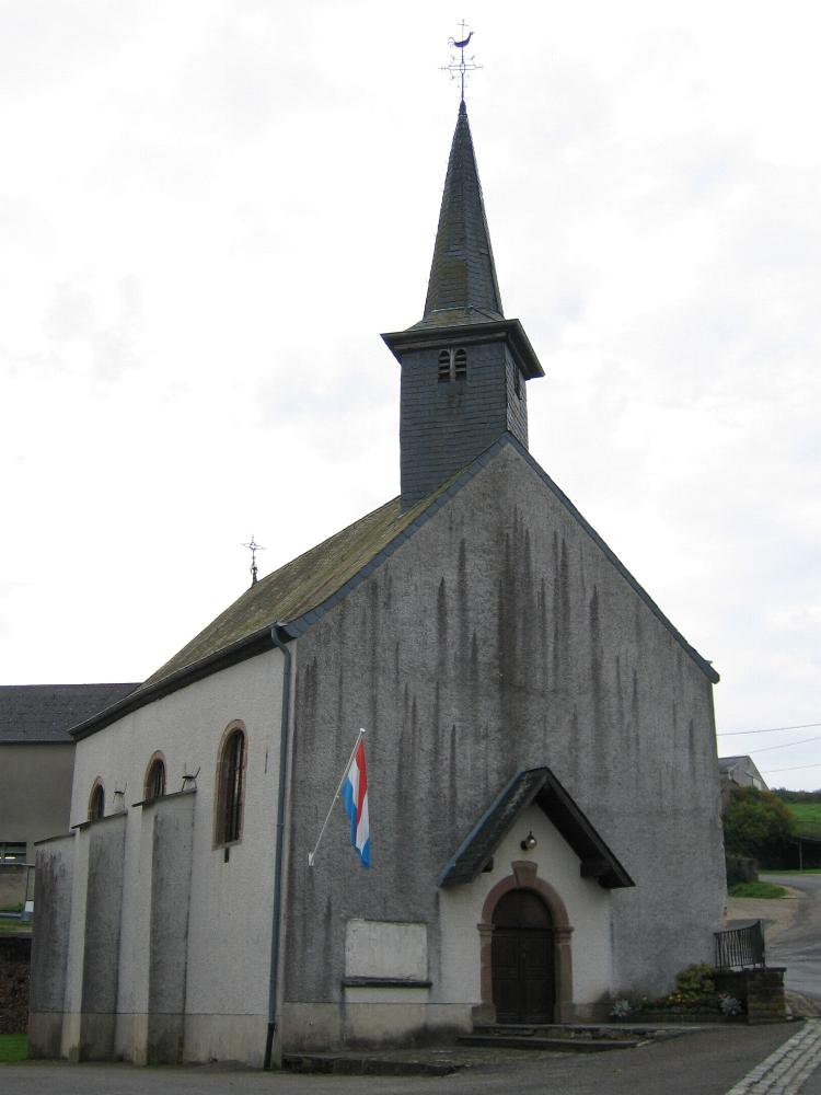 D'Kierch vu Buckels vu baussen.